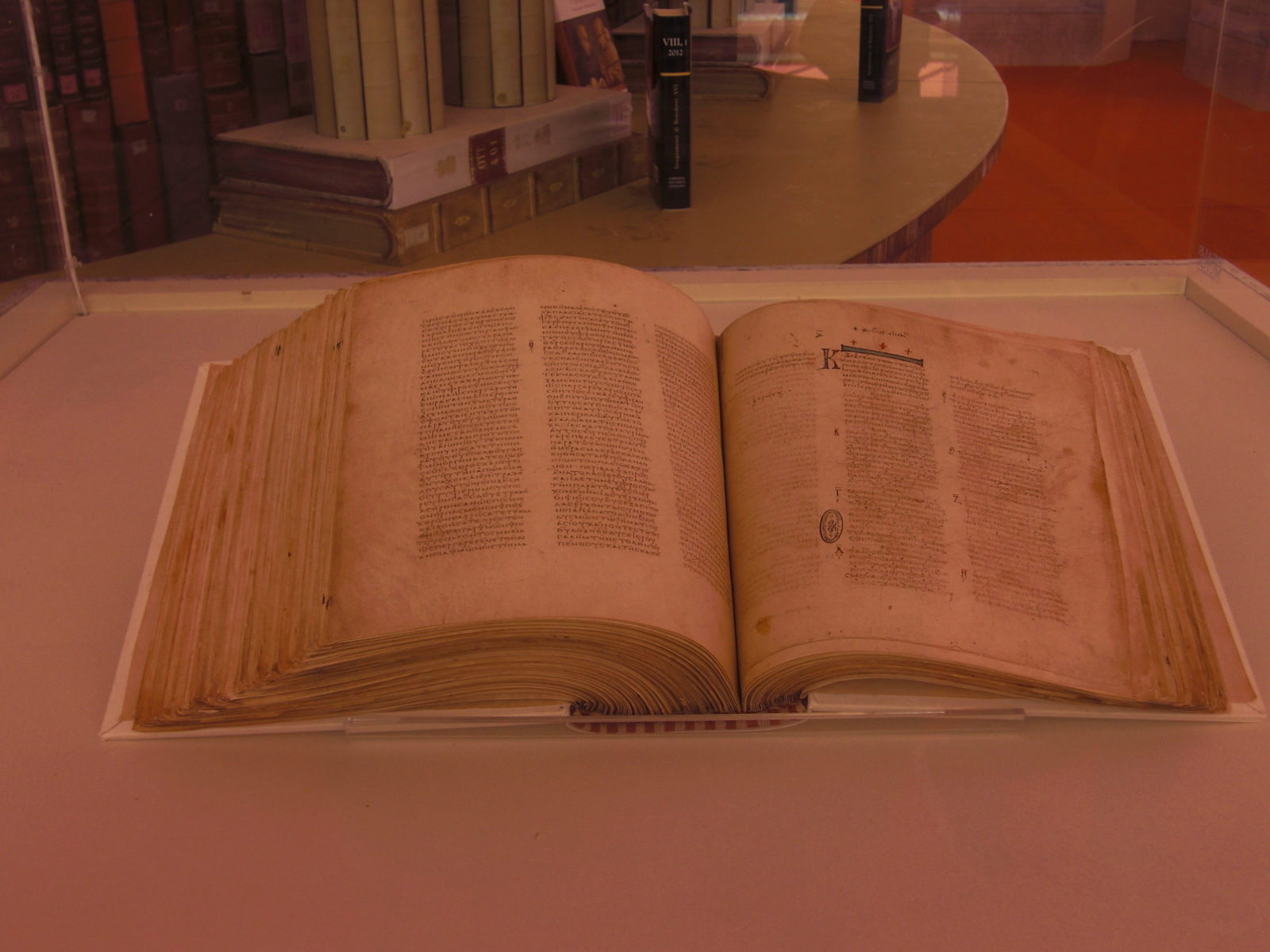 Codex Vaticanus, XXI Targi Wydawców Katolickich 2015